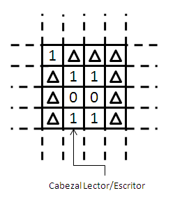 Diagrama de la cinta de una Máquina de Turing bidimensional.